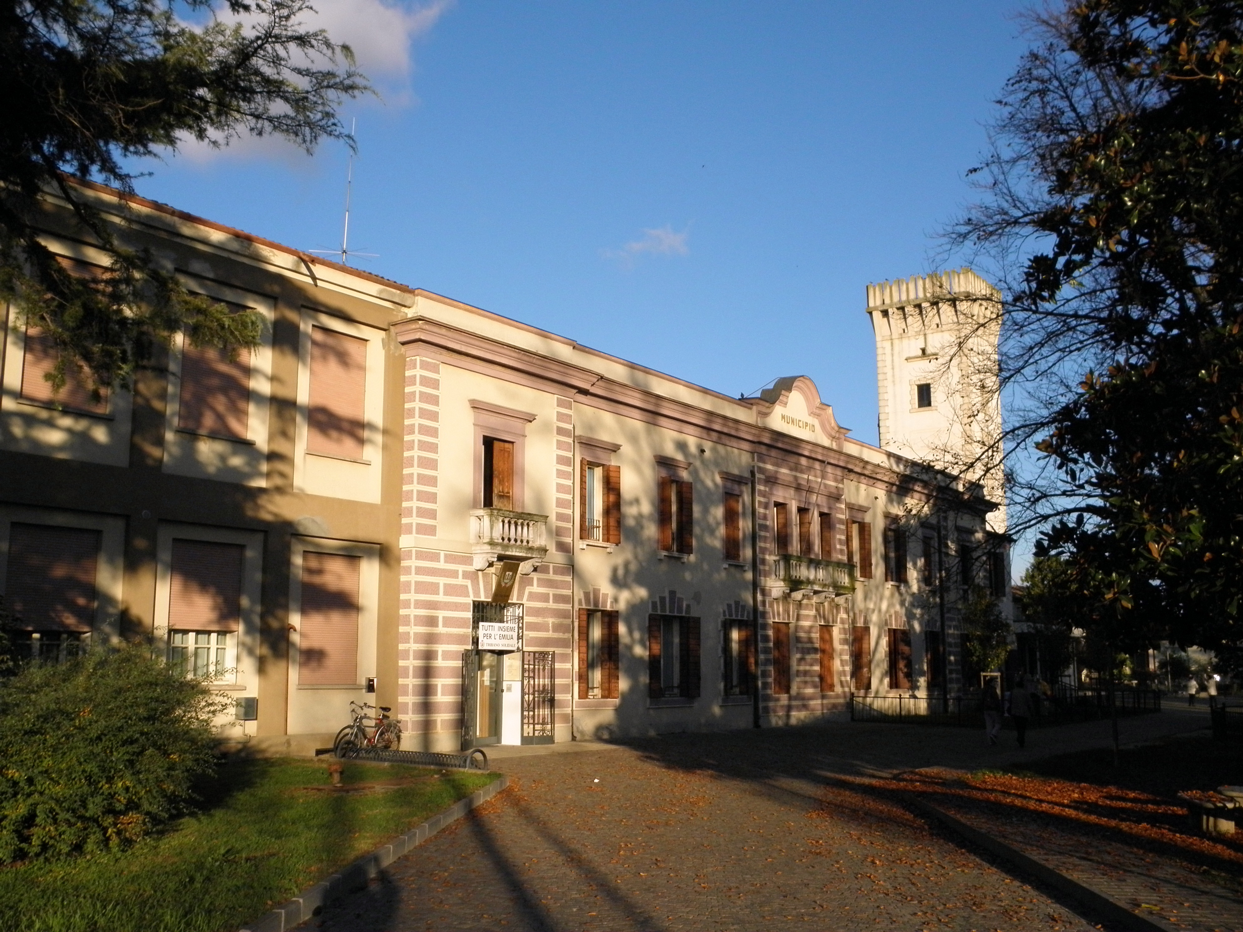 Tribano, palazzina che comprende le vecchie scuole, sulla sinistra, e centralmente il municipio.